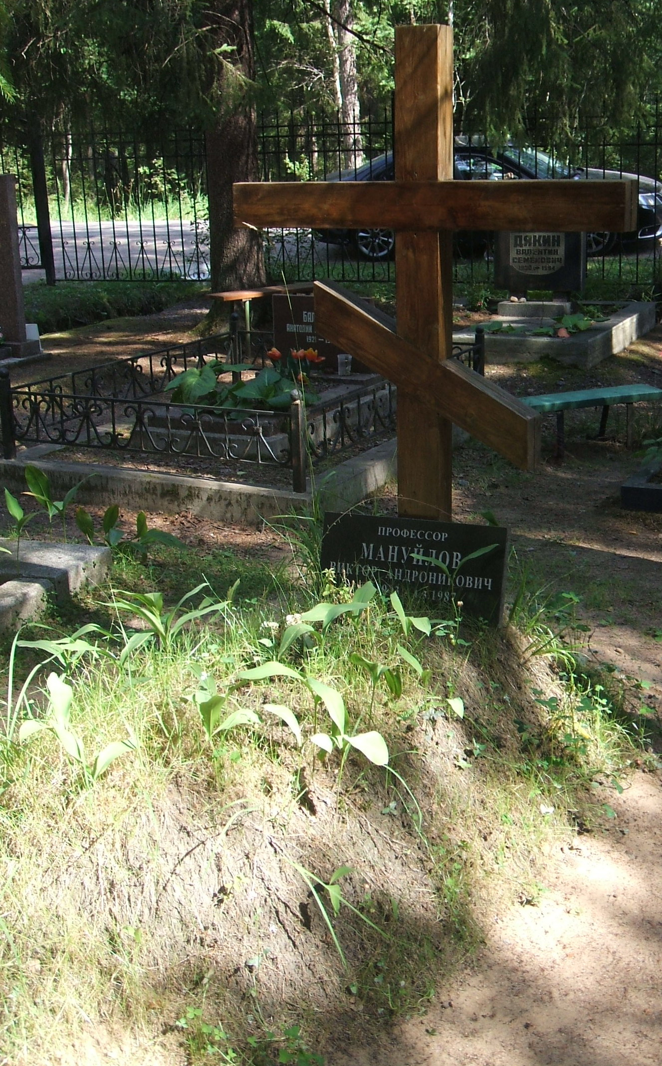 Комаровское кладбище Деятели культуры и науки